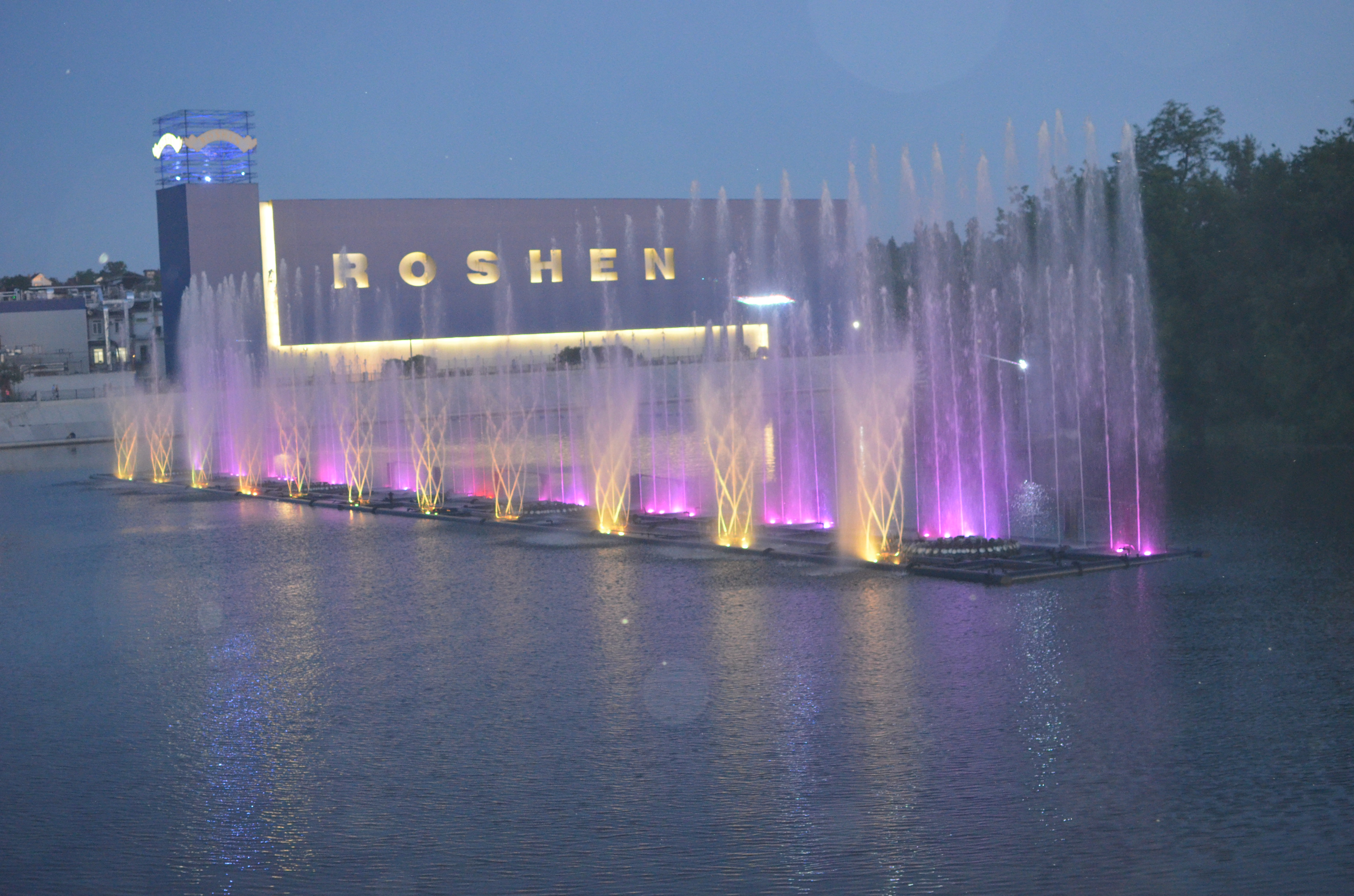 Фонтан Рошен. 2015 рік.